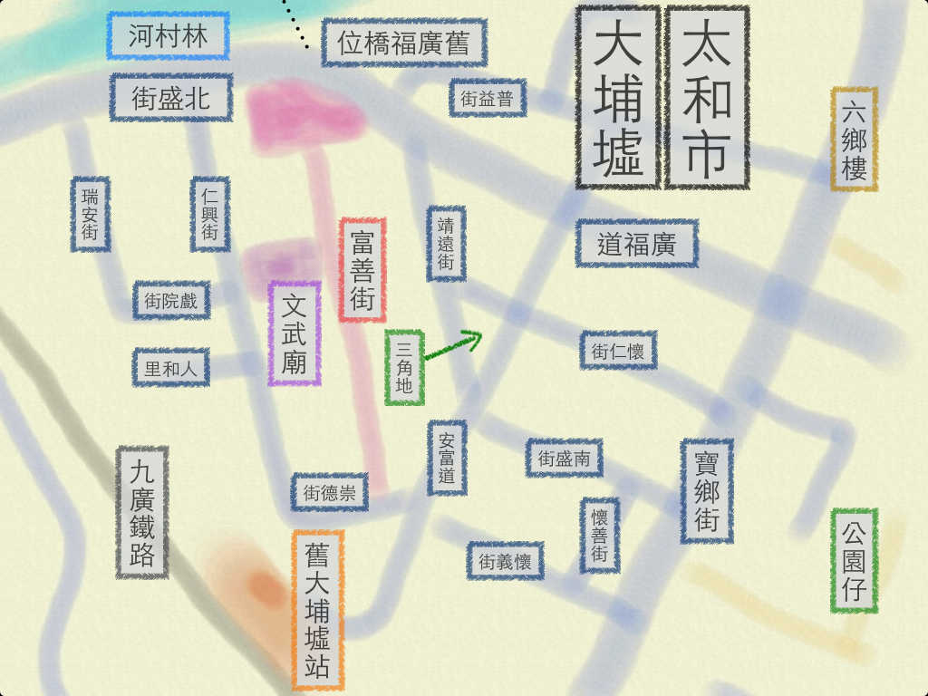 粵語: 太和市，卽大埔墟，地圖